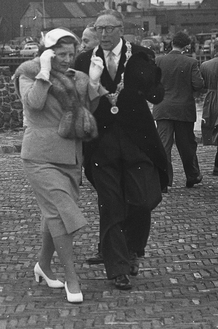 Collectie / Archief : Fotocollectie Anefo Reportage / Serie : [ onbekend ] Beschrijving : Koningin Juliana onthult het vissersmonument te IJmuiden Annotatie : Het beeld is een ontwerp van Han M. Wezelaar Datum : 8 juli 1955 Locatie : IJmuiden, Noord-Holland Trefwoorden : burgemeesters, koninginnen, onthullingen, oorlogsmonumenten, vissers Persoonsnaam : Juliana (koningin Nederland) Fotograaf : Bilsen, Joop van / Anefo, [onbekend] Auteursrechthebbende : Nationaal Archief Materiaalsoort : Glasnegatief Nummer archiefinventaris : bekijk toegang 2.24.01.09 Bestanddeelnummer : 907-2236 Reacties Geplaatst door Neeltje Maria op 24 maart 2016 - 11:18. Burgemeester mr. M.M. Kwint